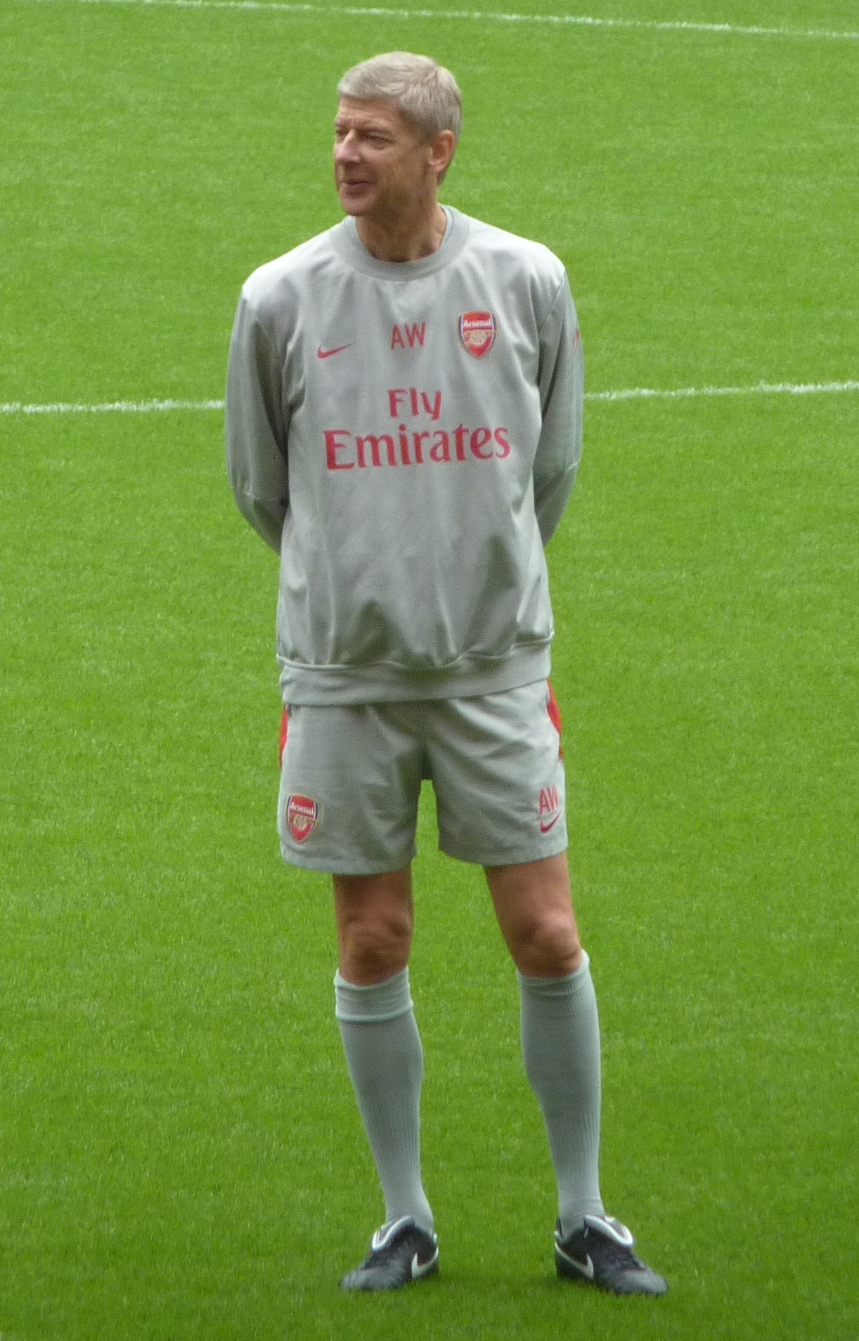 Arsène Wenger in training.